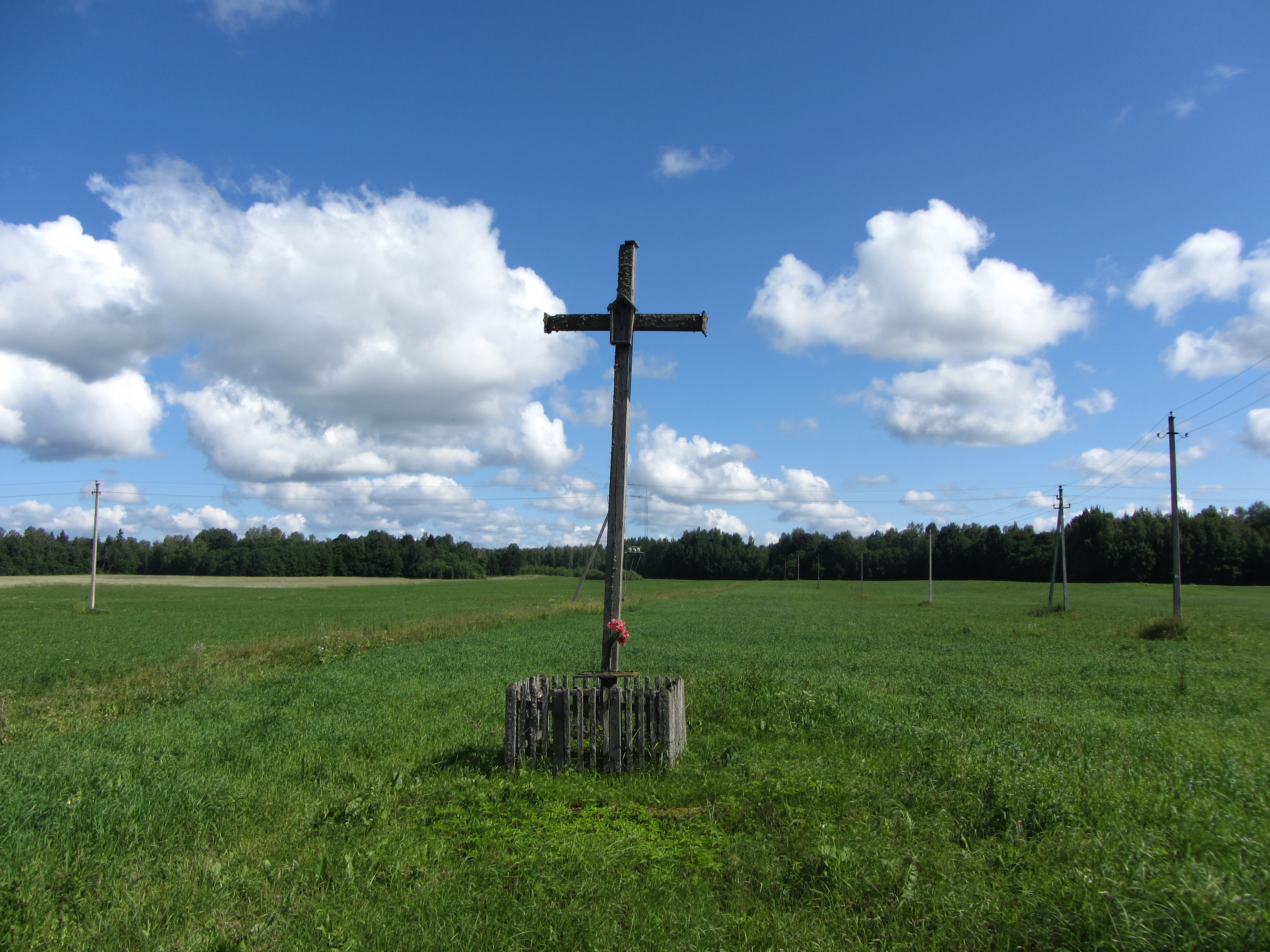 Pabradės sen., Lithuania